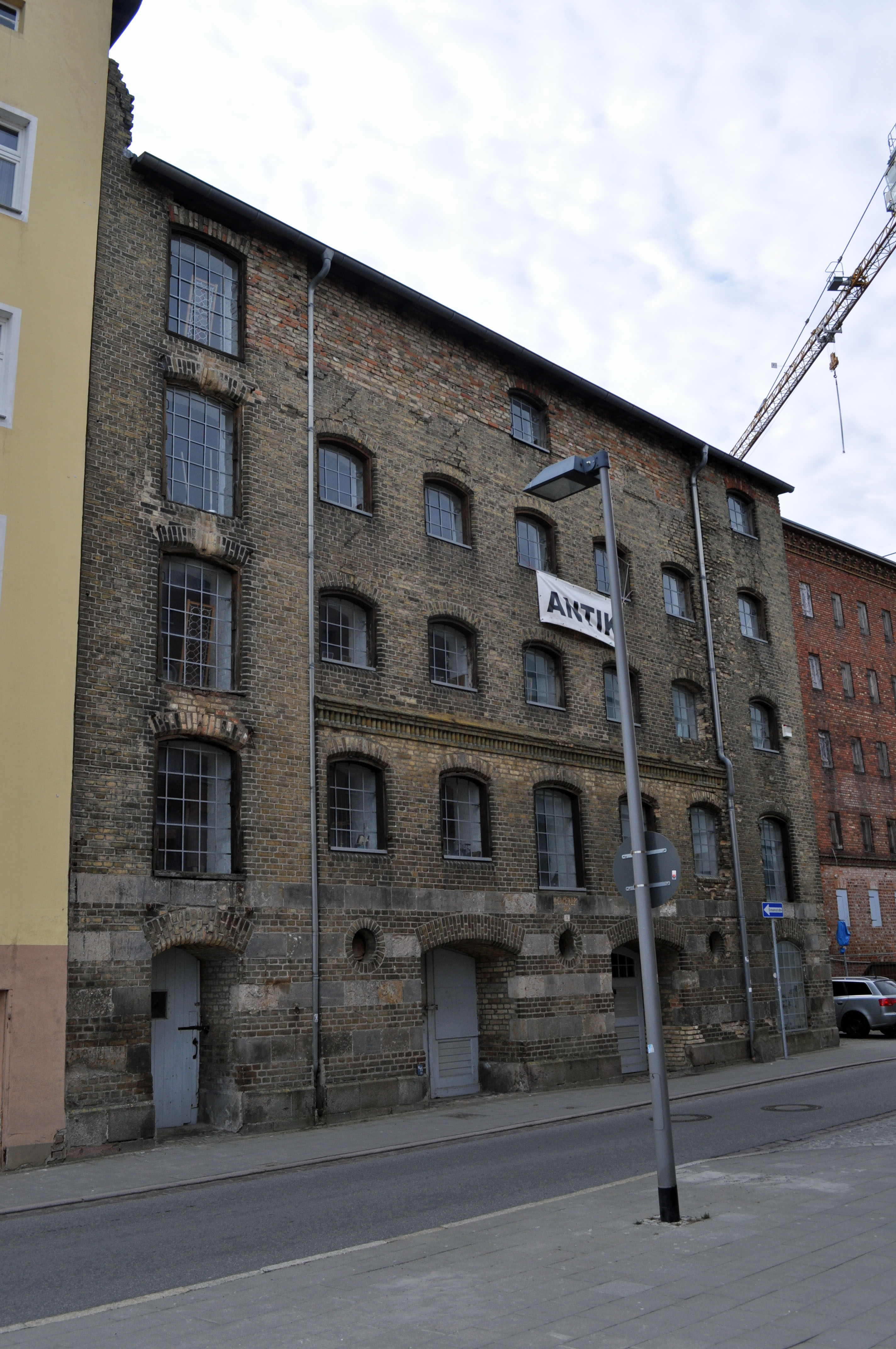 Gebäude bzw. Gebäudedetail in Stralsund. Straße und Hausnummer siehe Dateiname.